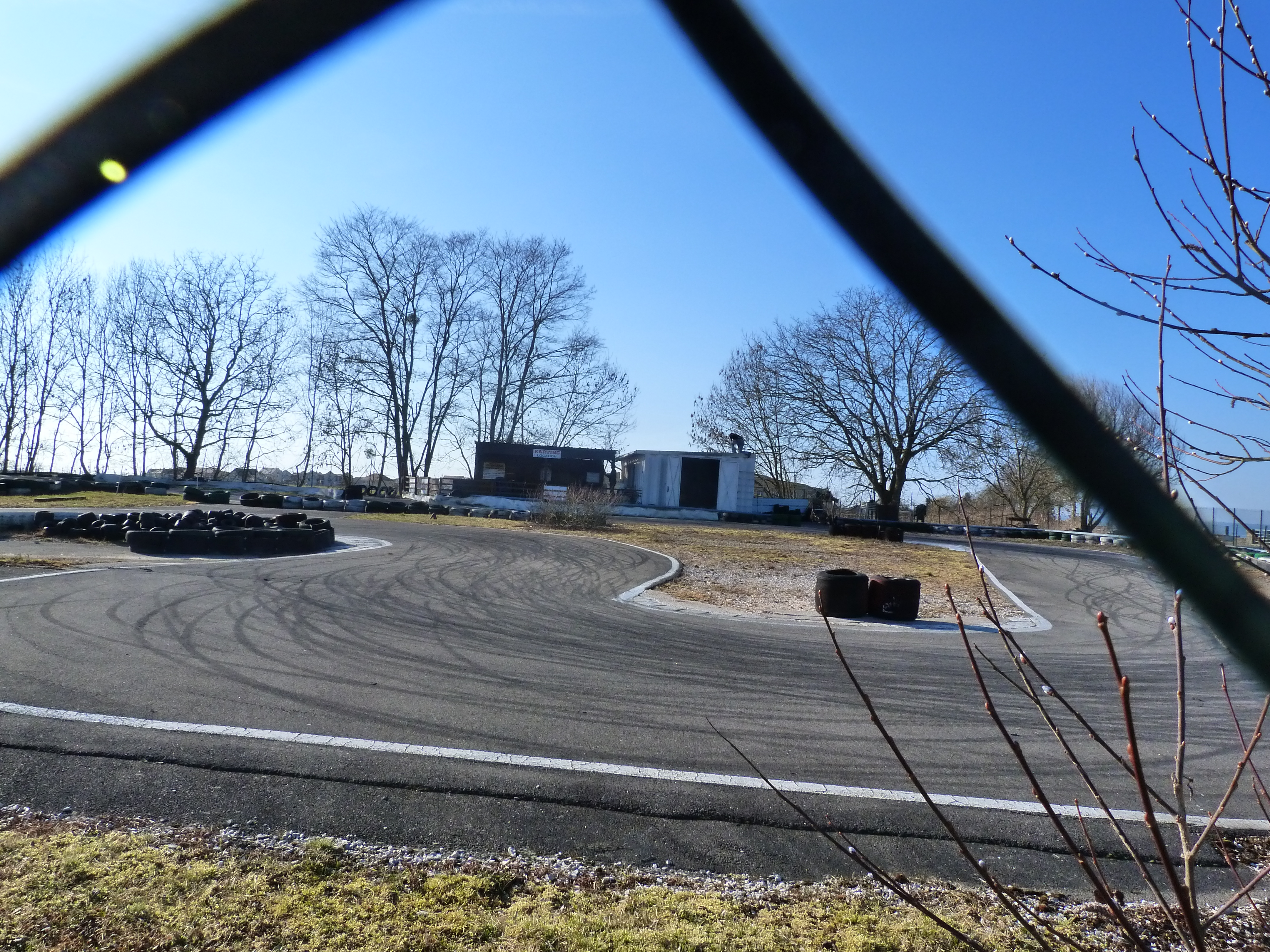 Karting